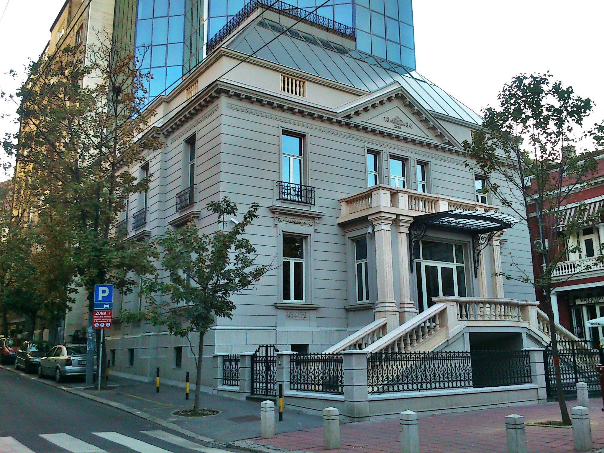 Кућа породице Миловановић